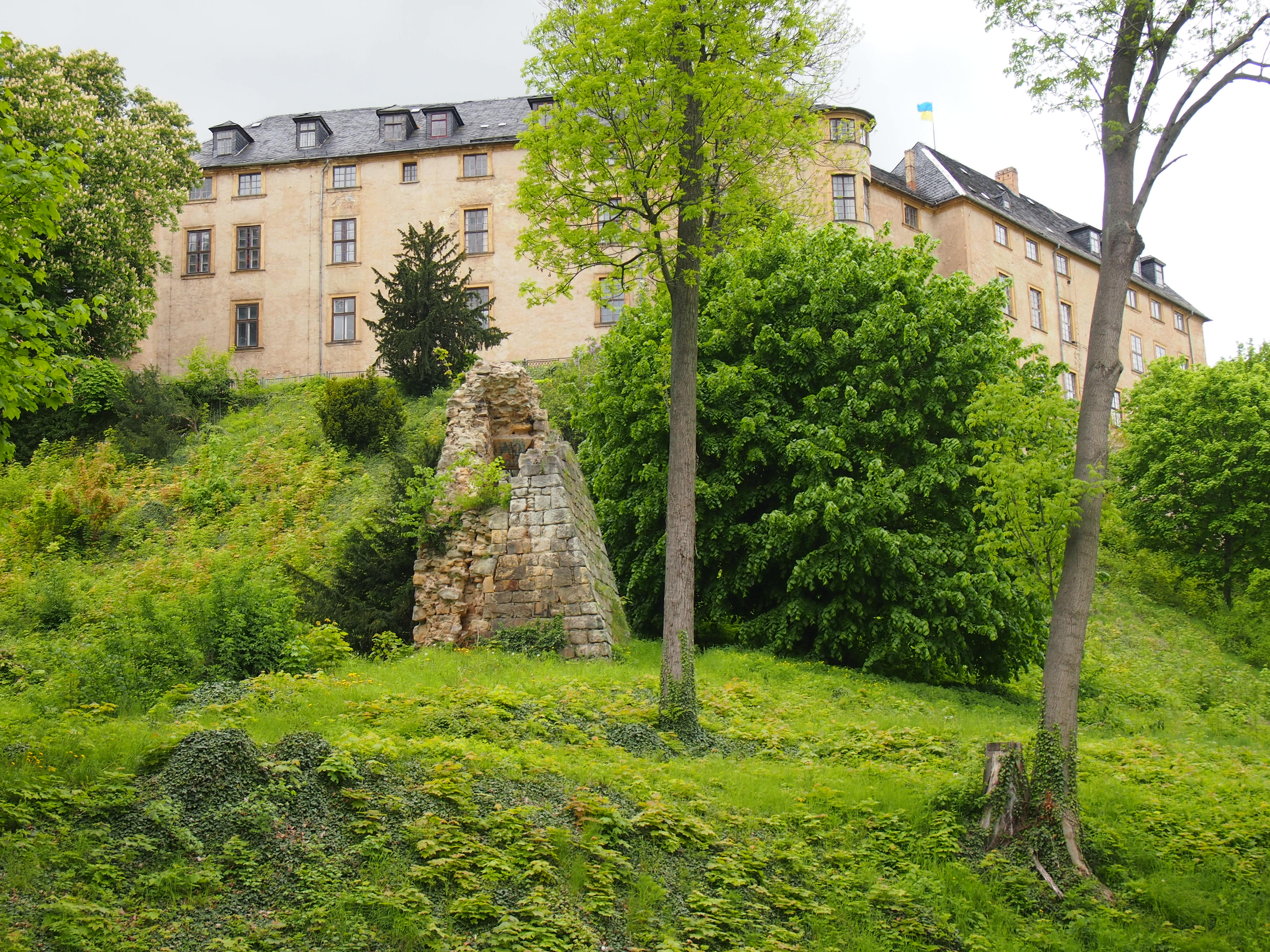 Schloss Blankenburg vom Schlossgarten aus